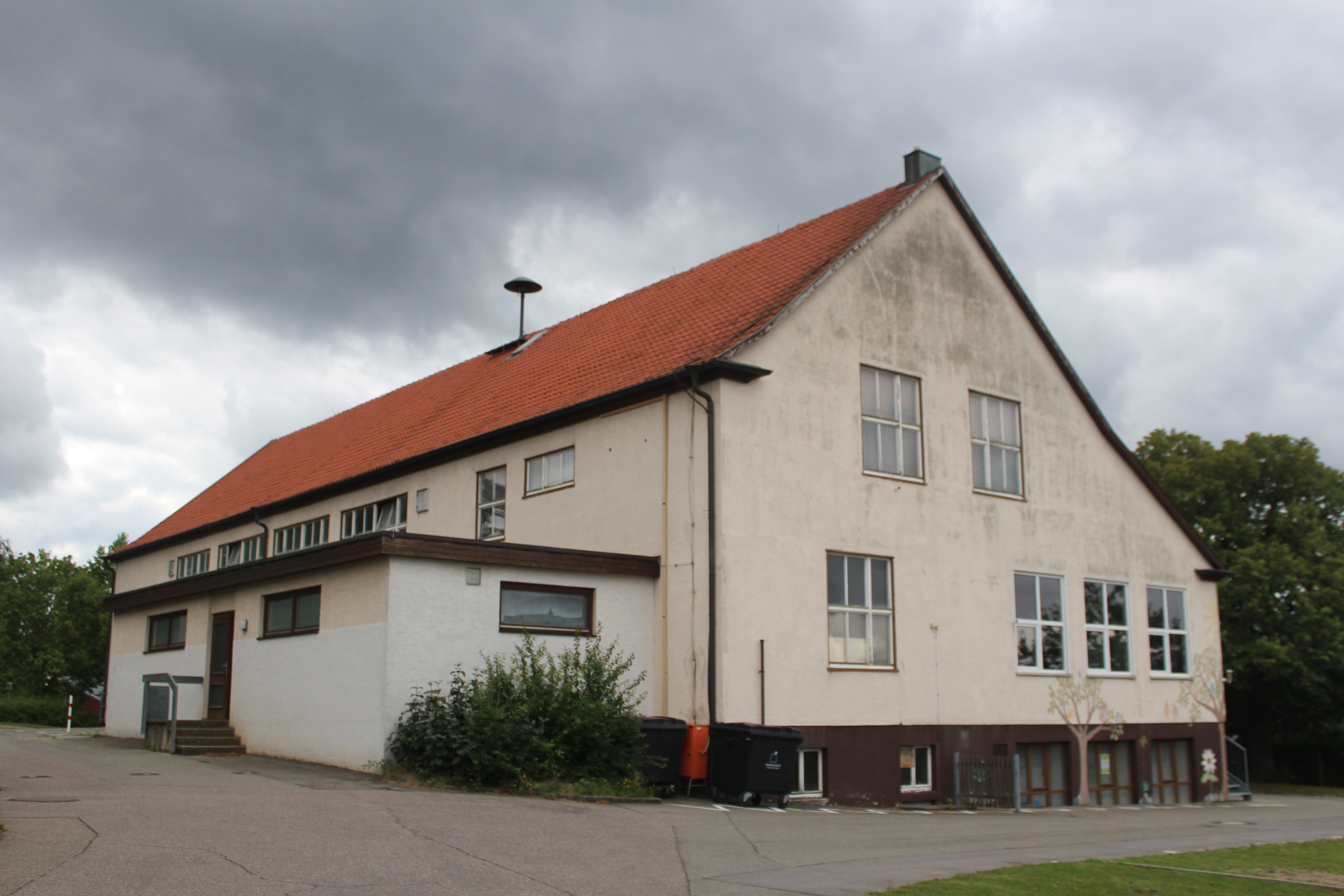 Festhalle "Graf-Ulrich-Bau" in Grafenau-Döffingen